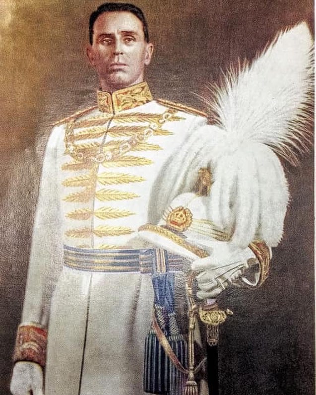 Ritratto del Vicerè d' etiopia S.A.R. il Duca d' Aosta Amedeo di Savoia-Aosta